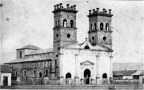 Imagen fachada antigua de la Catedral